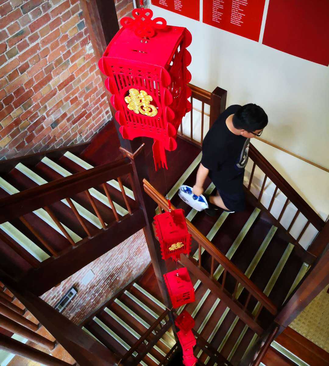 中文（中国大陆）: 澳华历史博物馆楼梯